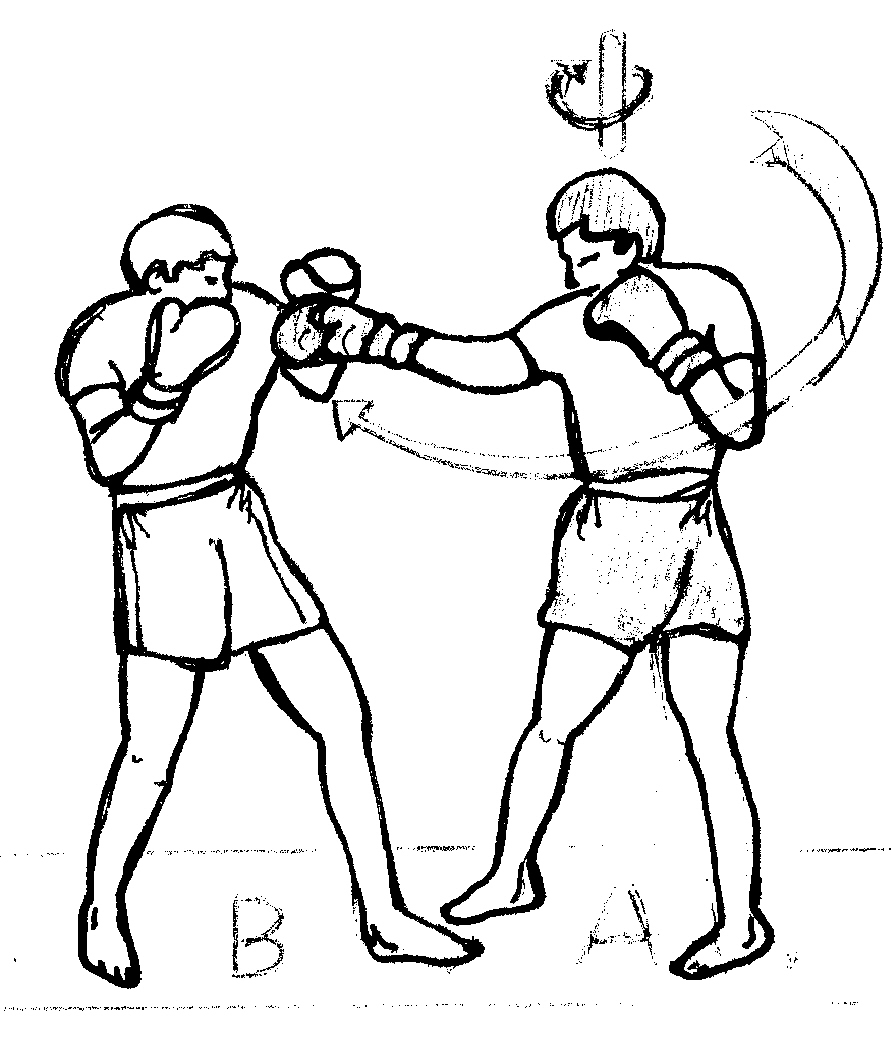 devie1.jpg